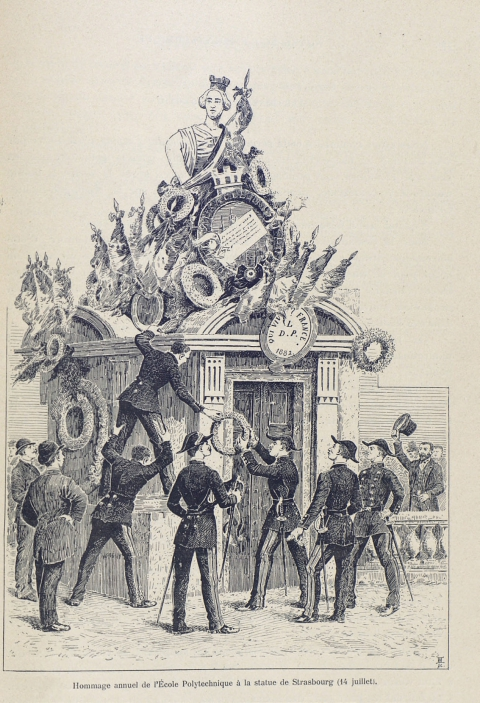 Gravure de l'hommage annuel de l’École polytechnique à la statue de la Ville de Strasbourg sur la place de la Concorde, le 14 juillet 1881, illustration de Gaston Claris dans son livre Notre École polytechnique, 1895